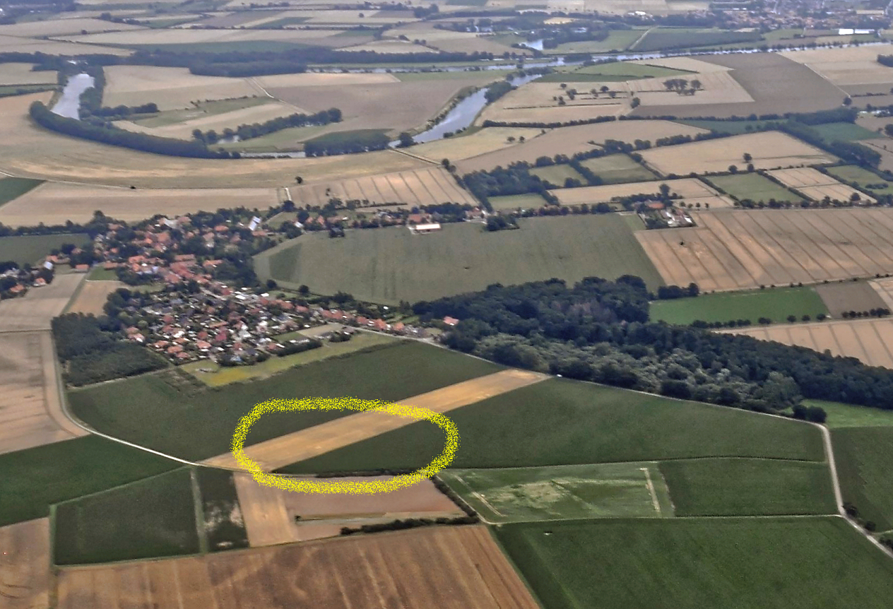 Bilder vom Flug Nordholz-Hammelburg 2015: Wellie (Bildmitte links), Stahlbeton-Fertigteilwerk Albert (Bildmitte rechts), hinten oberhalb von Wellie die Wellier Schleife der Weser. Nachträgliche Einzeichnung der ungefähren Lage des s Erdwerks von Wellie.